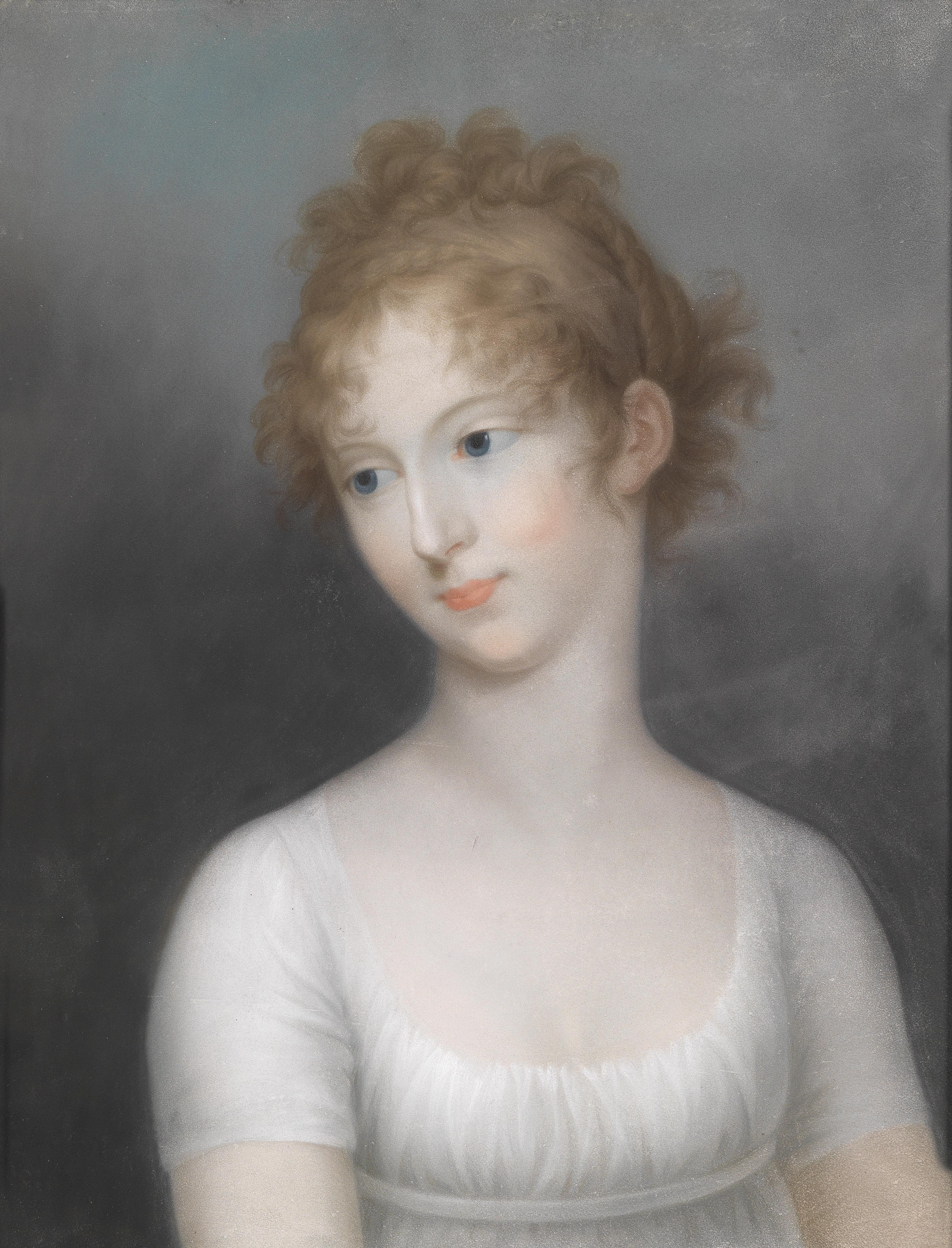 Bildnis der Elena Pavlovna in weißem Kleid, verso alte Beschriftung "paint par F. Wegener à Schwerin 1804", Pastell auf Papier, 52 x 40 cm